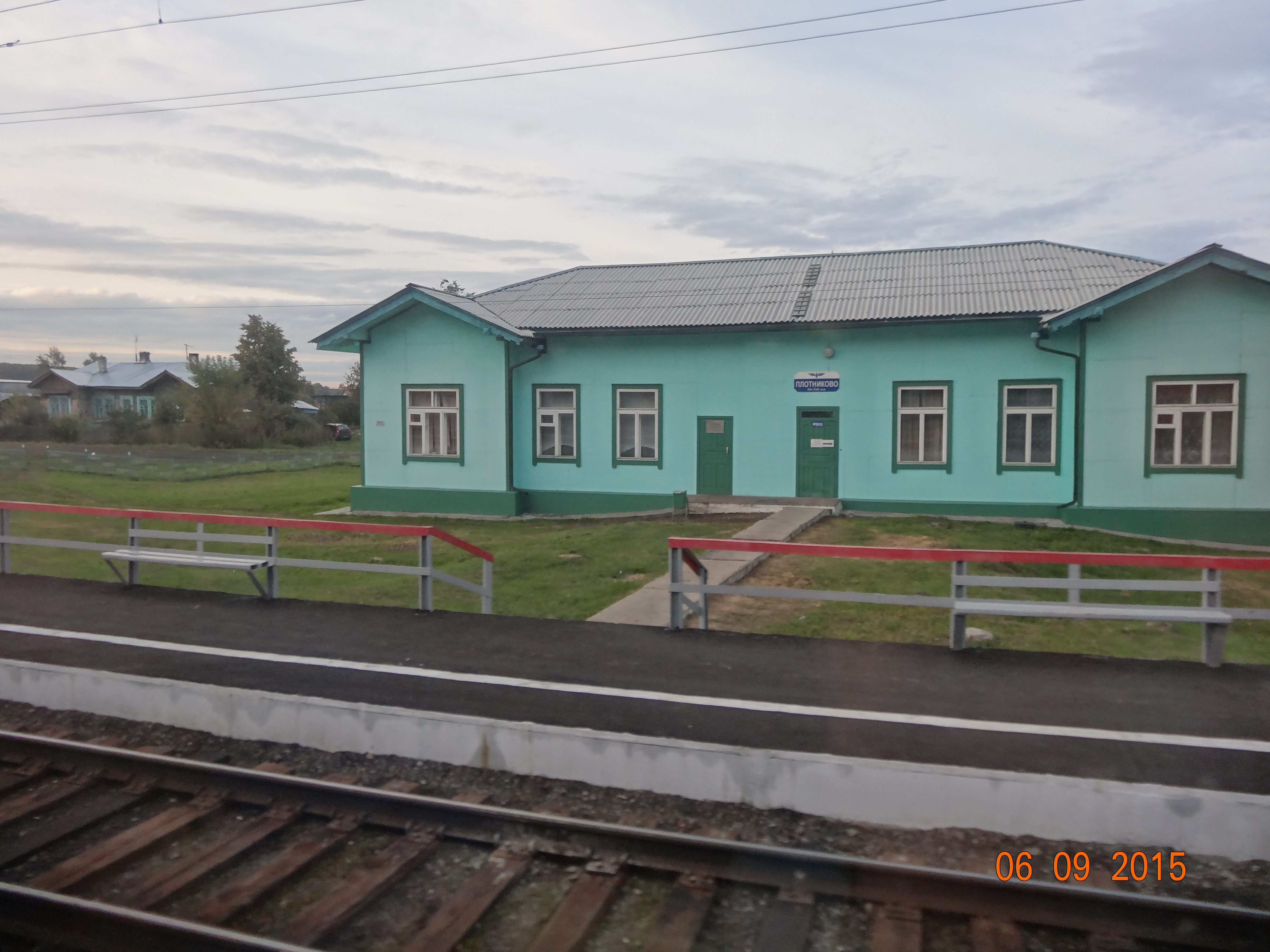 Плотниково...